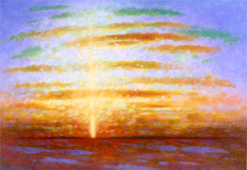 Sun Pillar